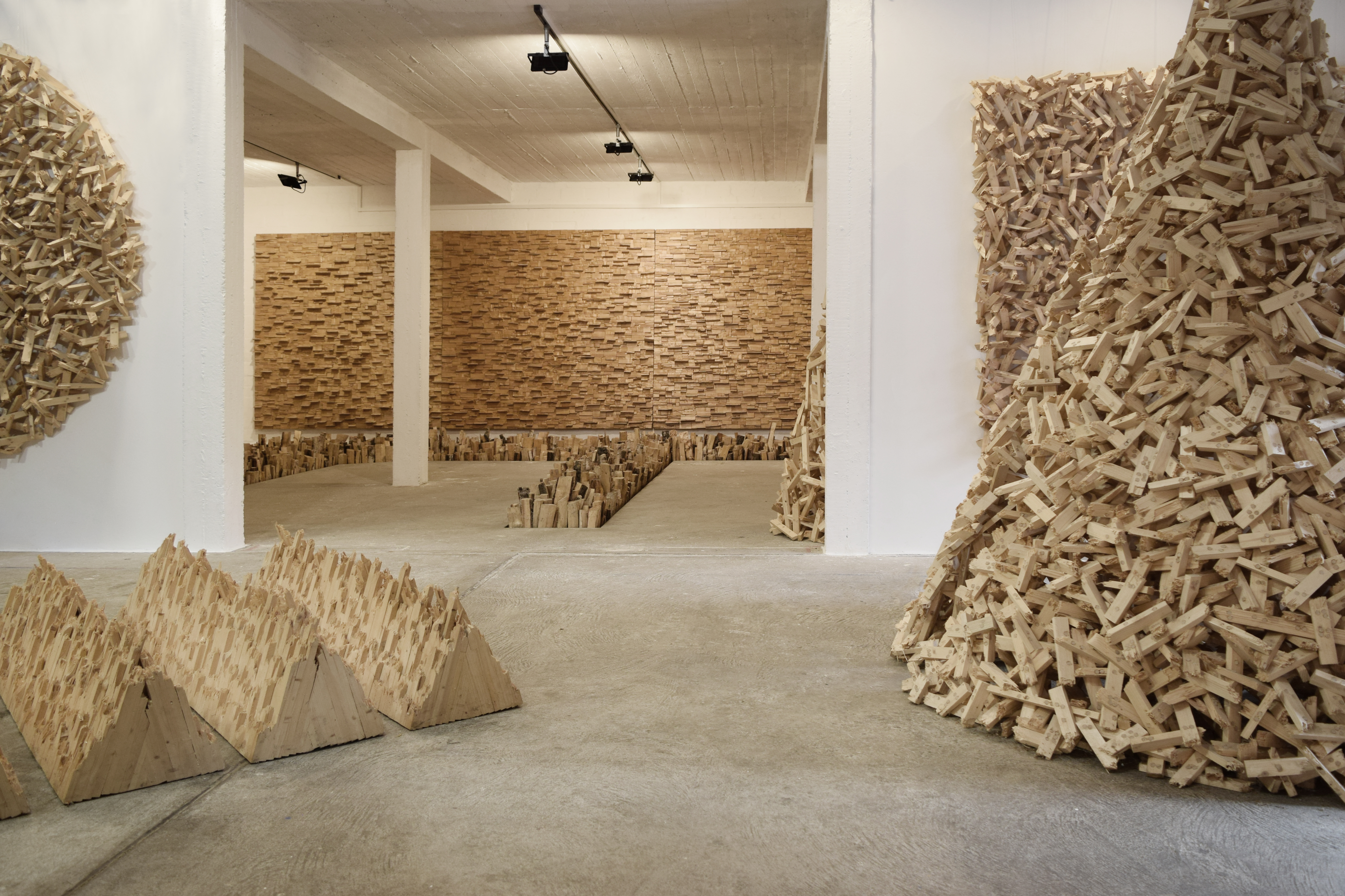 Räumlichkeiten der Sammlung 1